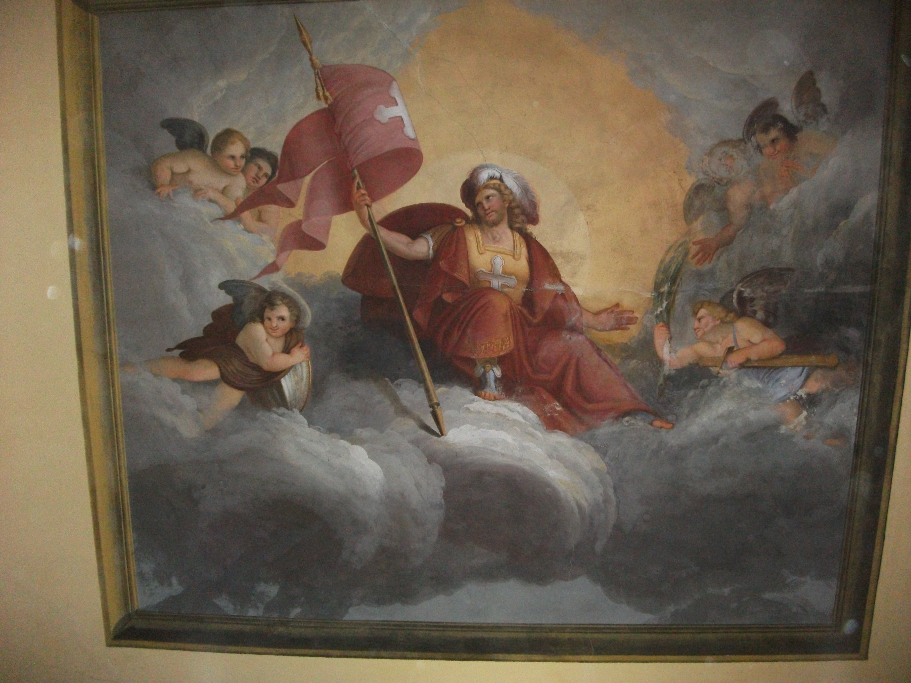 Affresco di Rodolfo Morgari rappresentante San Giuliano di Brioude, chiesa di Barbania